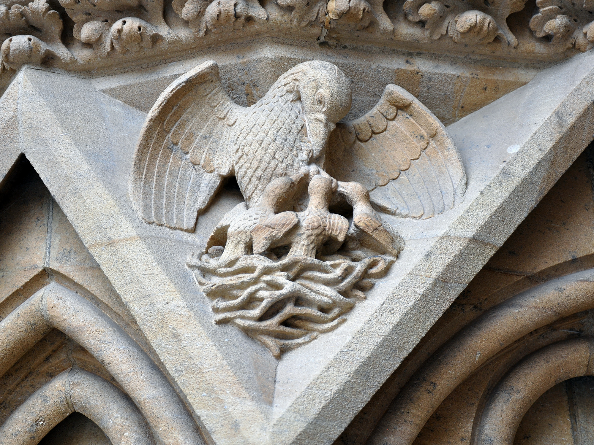 Cathédrale Saint-Etienne de Metz, le Portail de la Vierge.Détail: le pélican.